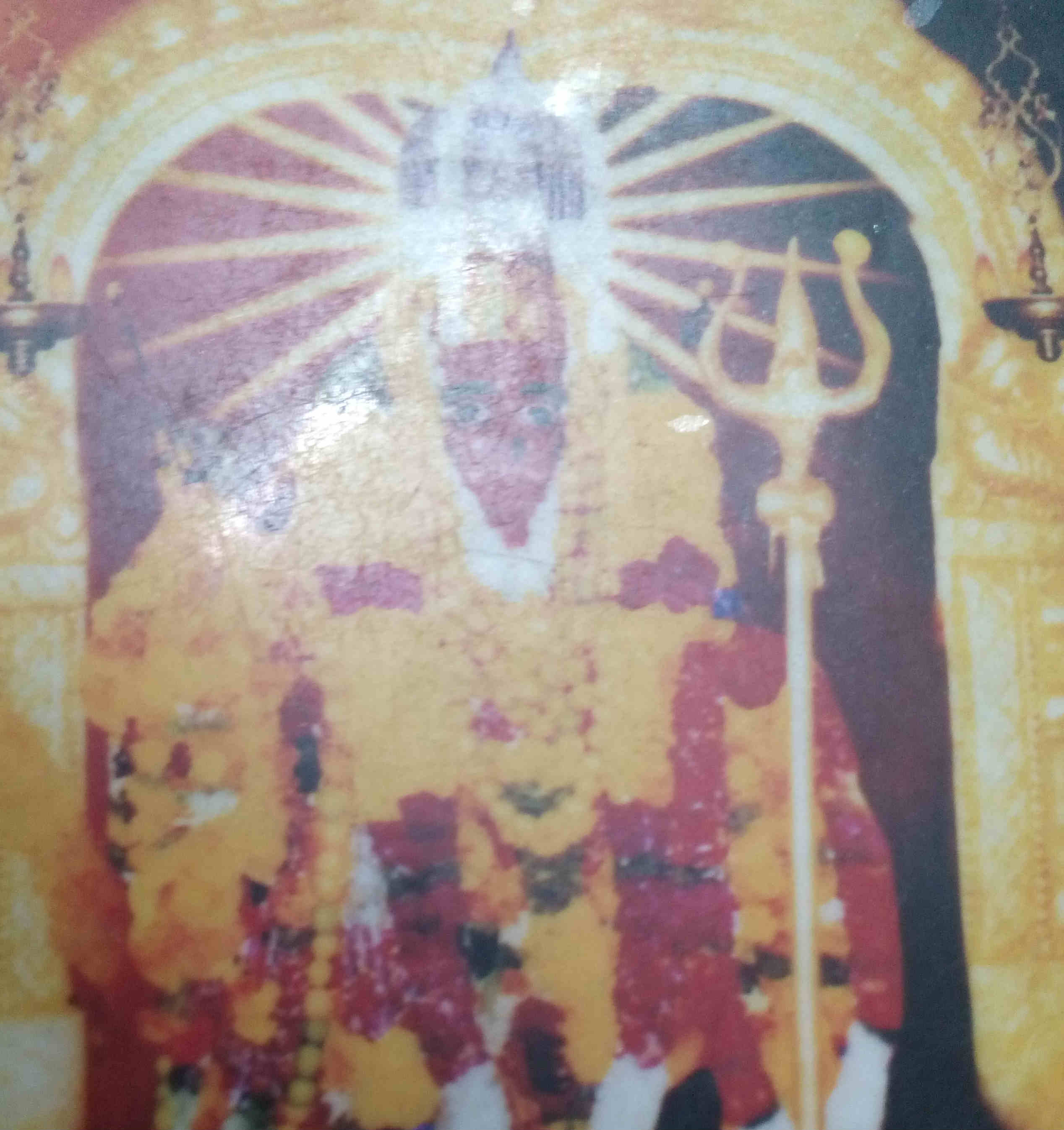 Sree Nagarapamma Temple